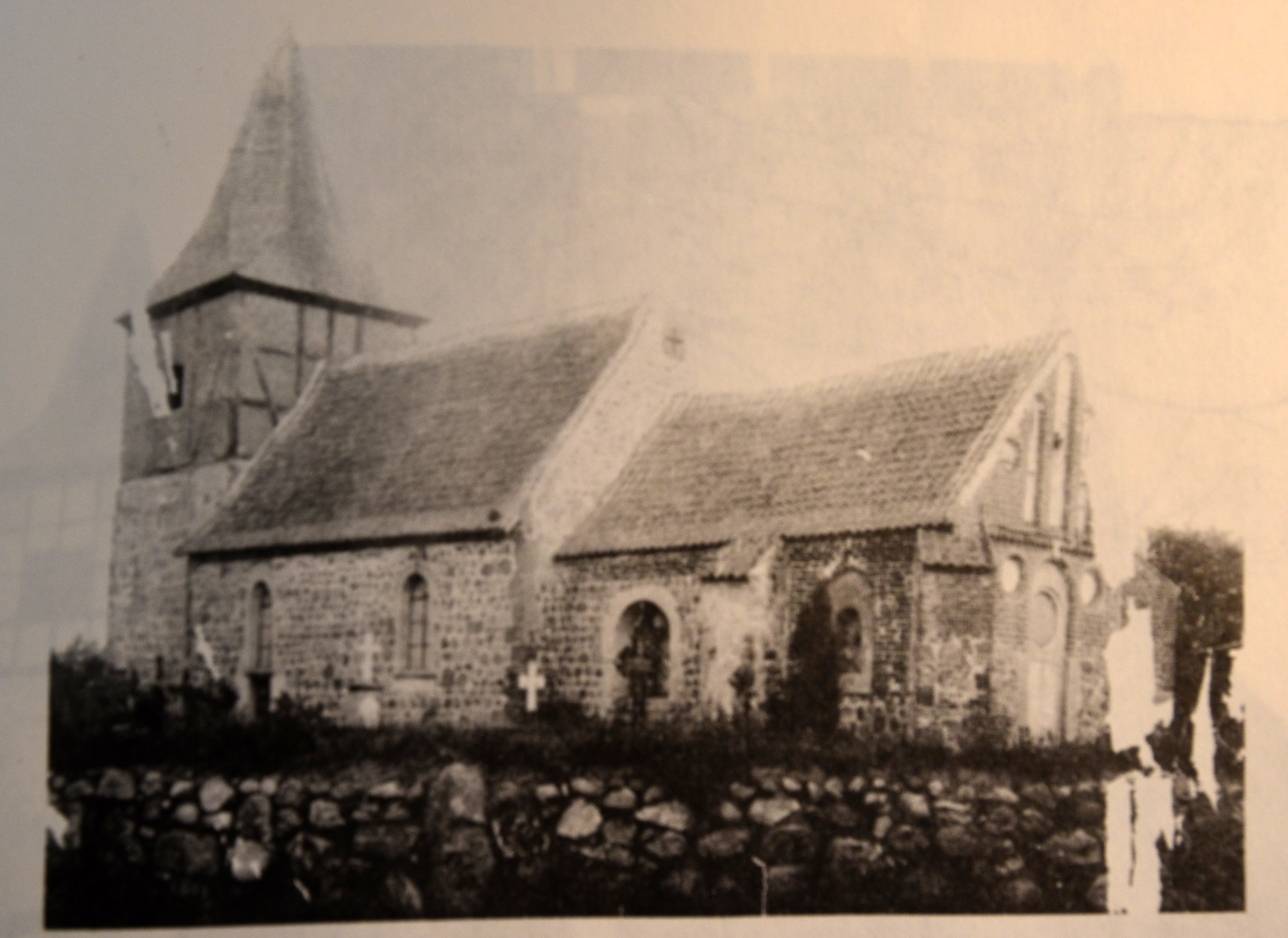 Kirche zu Bexhövede im Jahr 1895